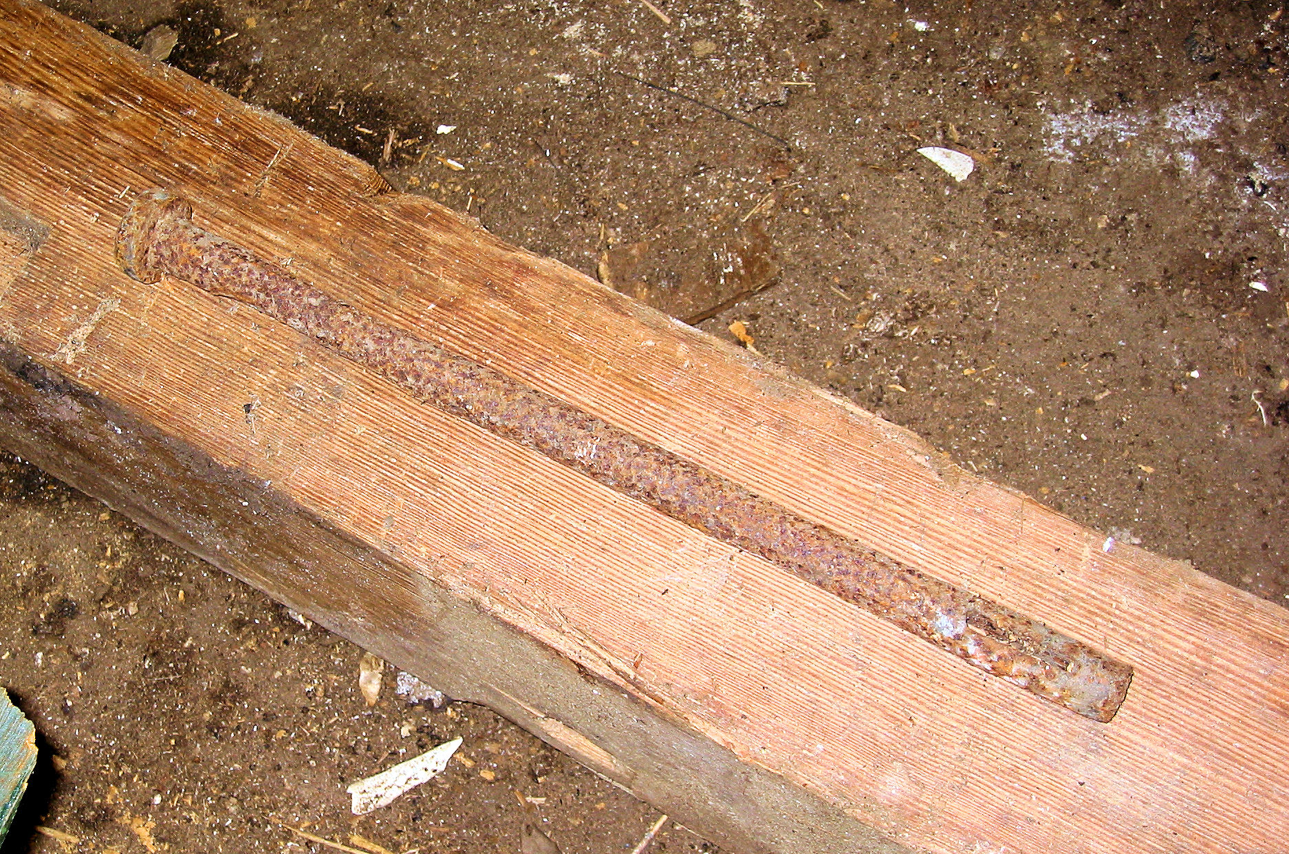 Spijlbout van de Concordia molen te Ede